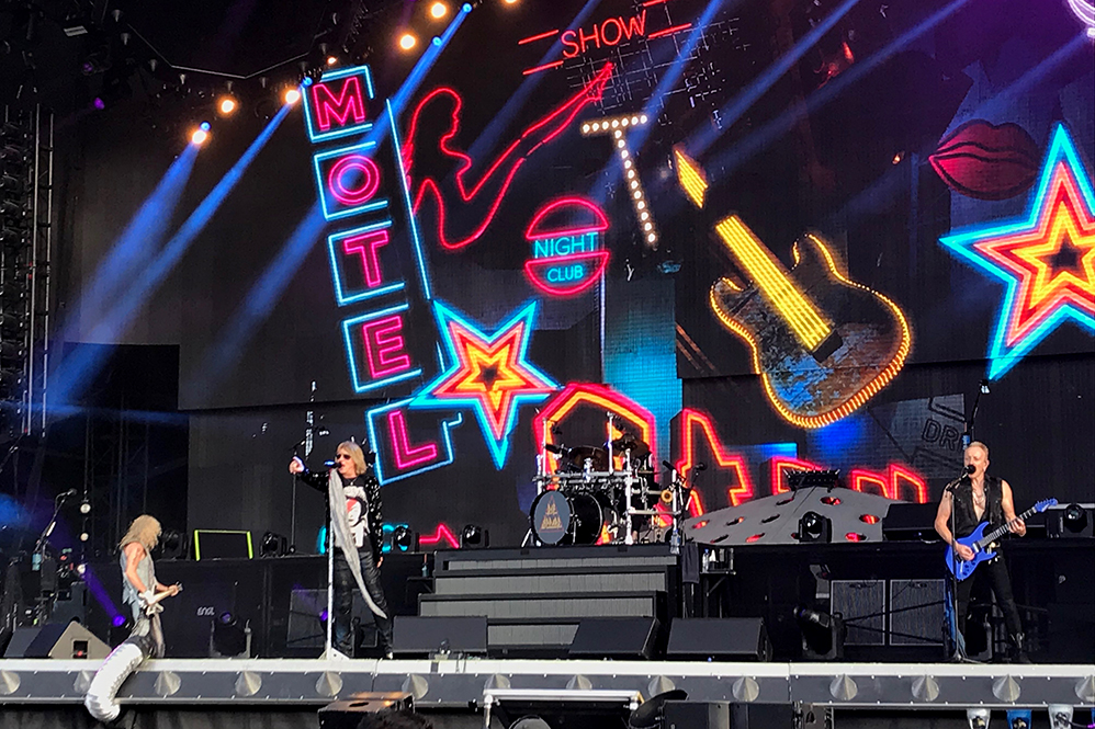 Sur la Mainstage 01 du Hellfest (2019), le groupe Def Leppard a assuré un set convaincant quoique calme.